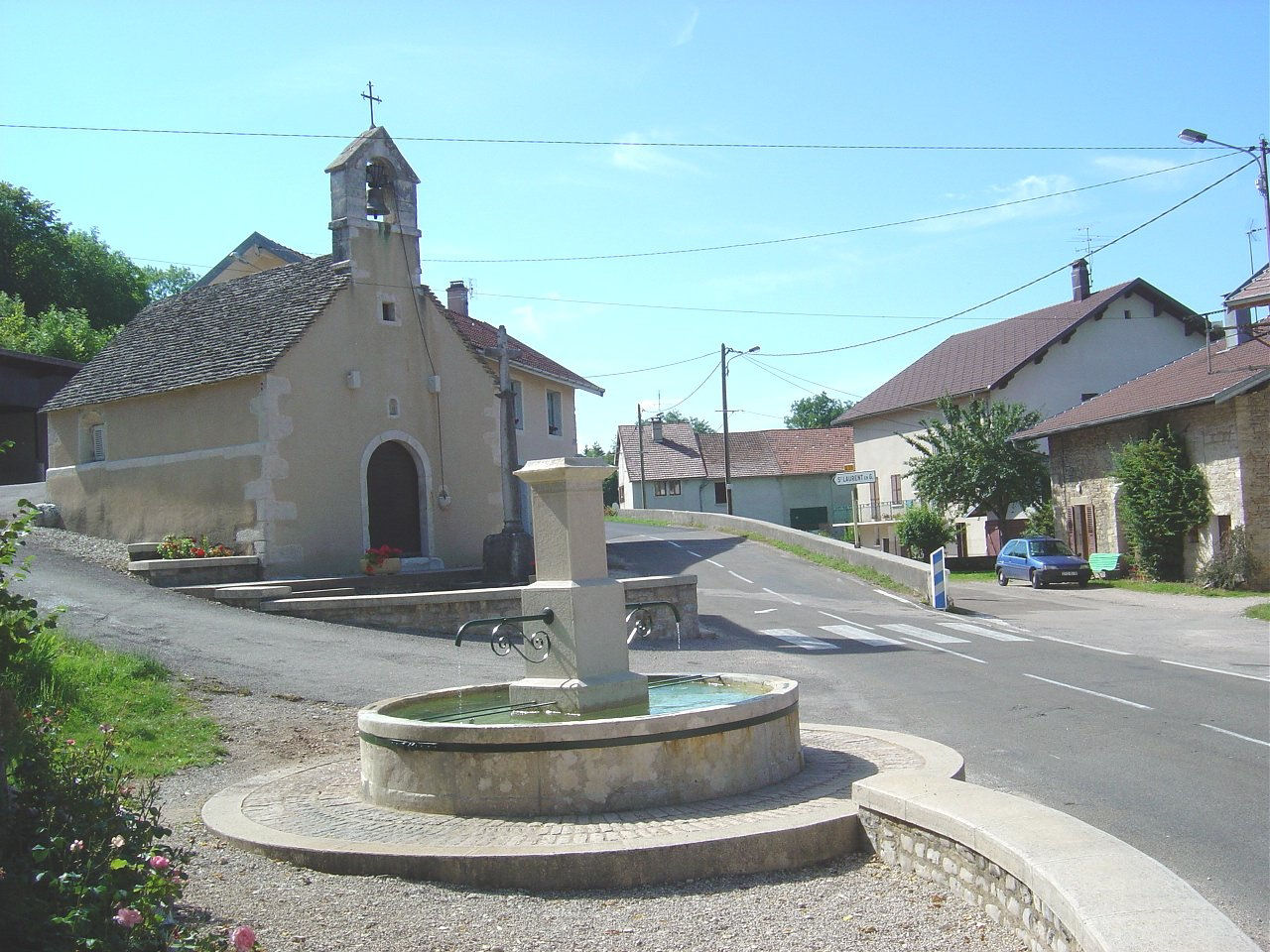 Menétrux-en-Joux (Jura - France)